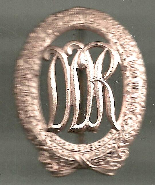 Großes Sportabzeichen der DDR in Bronze